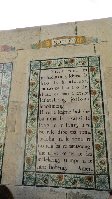 Church of the Pater Noster, Mount of Olives, Jerusalem, Israel כנסיית אבינו שבשמים Sanctuary of the Eleona